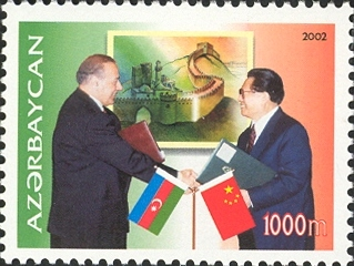 Azeri postage stamp